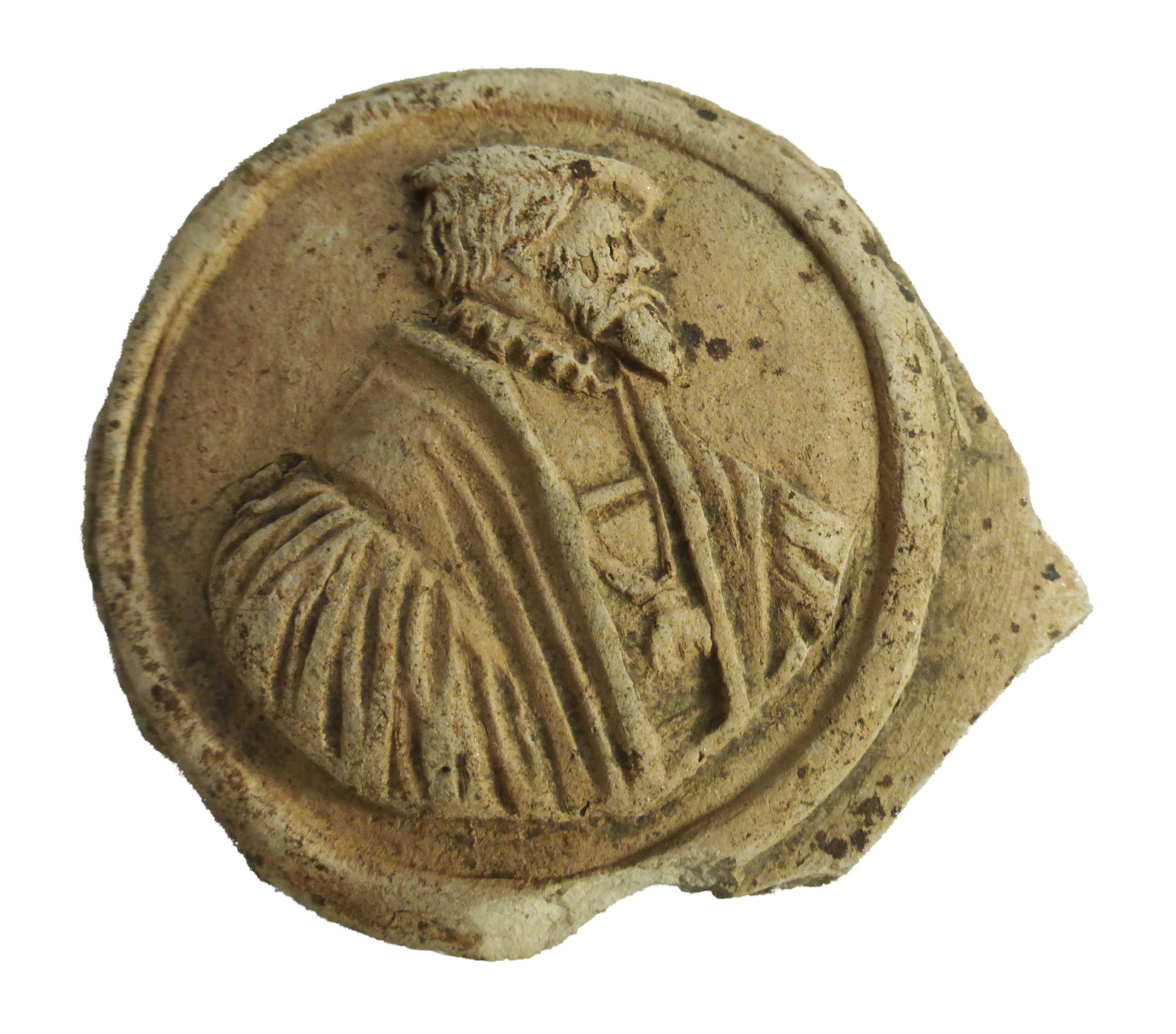 Tonscherbe mit Kaiser Karl V. aus Gschaid